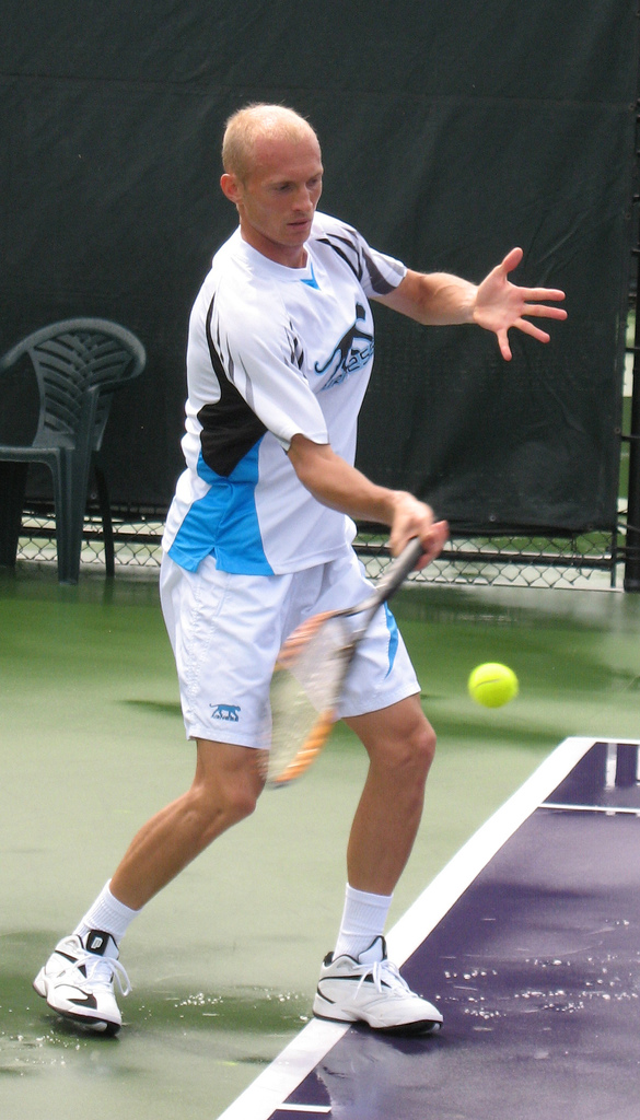 Nikolay Davydenko, Miami, Florida, 2007